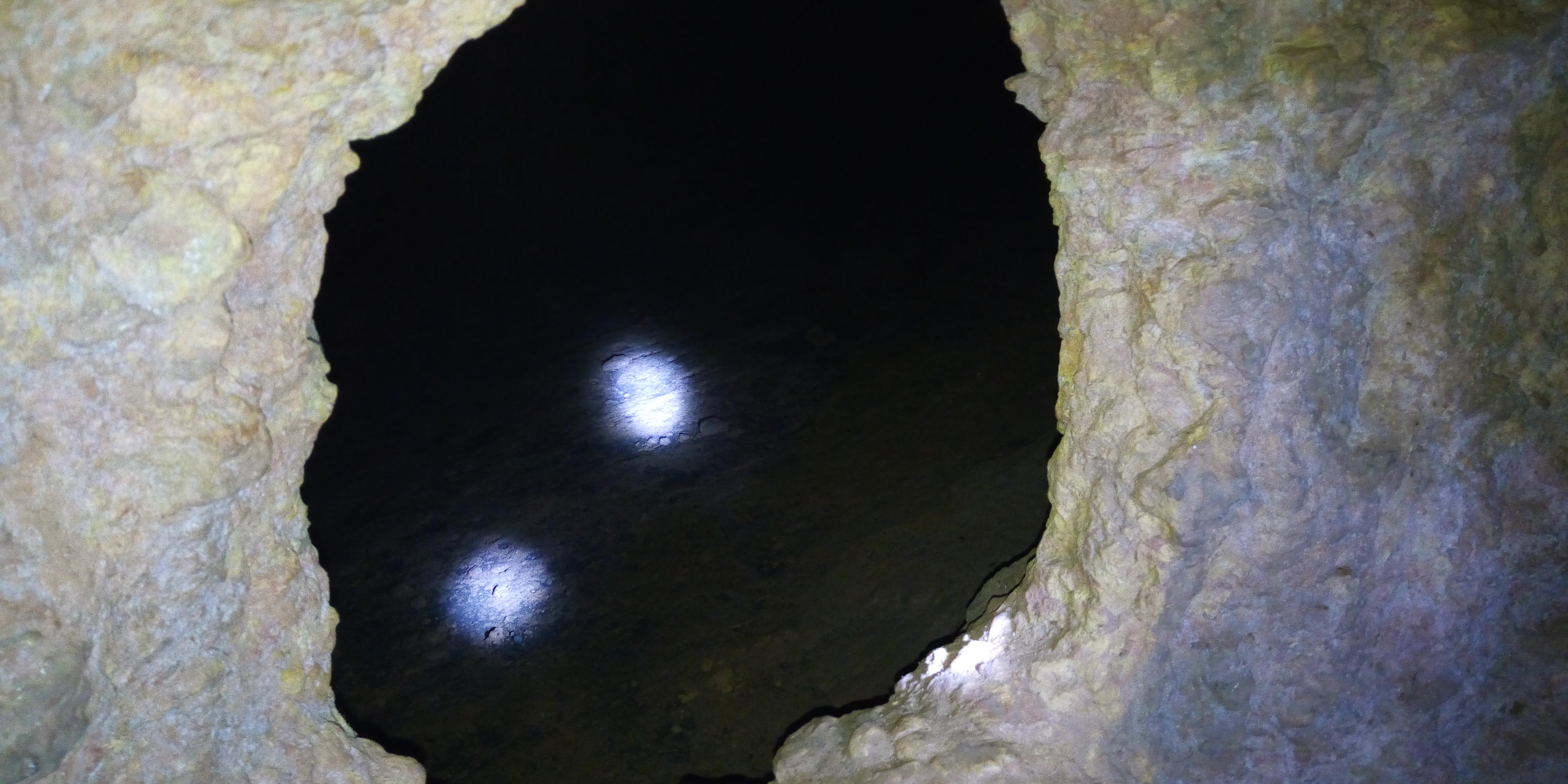 Un orifice de communication entre des hommes à queue au sous sol de la galerie souterraine sur le site à Goundoudji dans la commune de Dogbo au Bénin vu rapproché